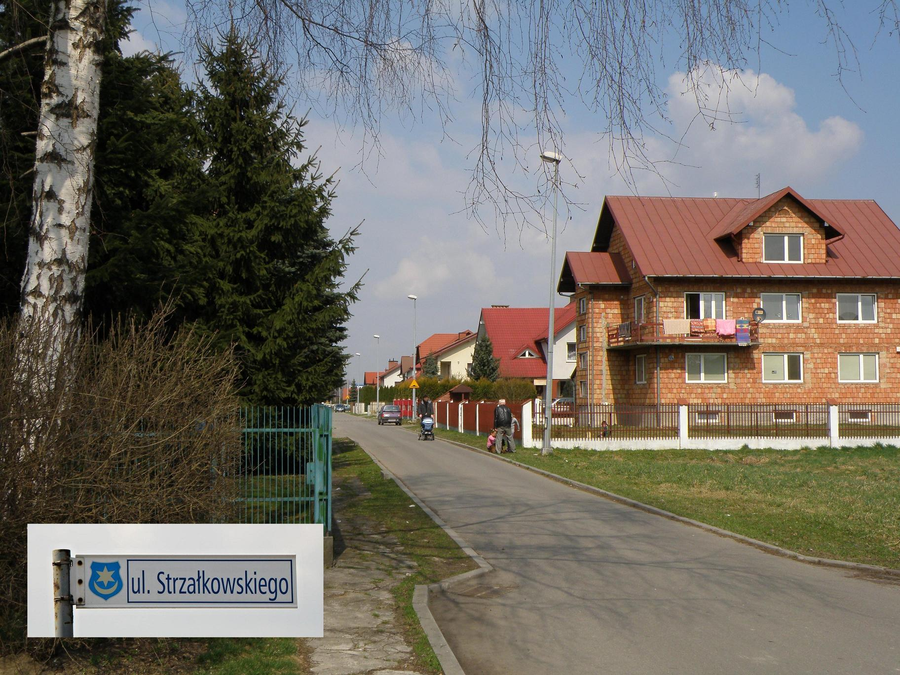 Ulica Zbigniewa Strzałkowskiego w Tarnowie. W tym mieście m.in. uczęszczał do szkoły średniej.